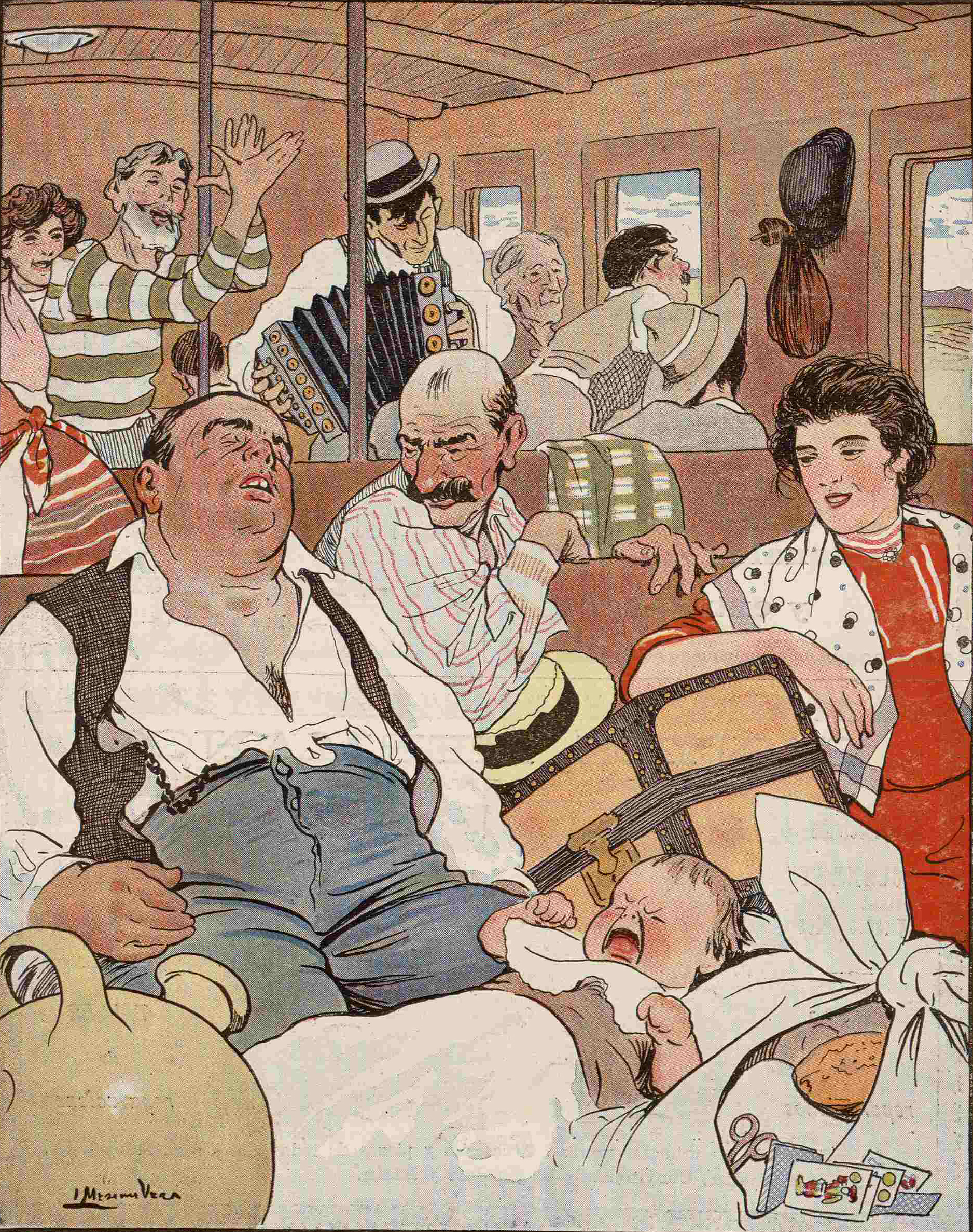 Los de la orden botijil.